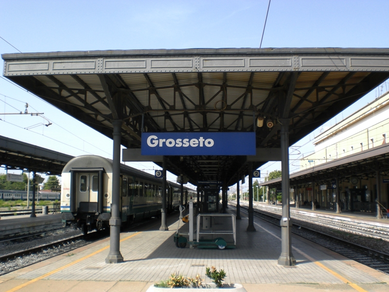 FS di Grosseto